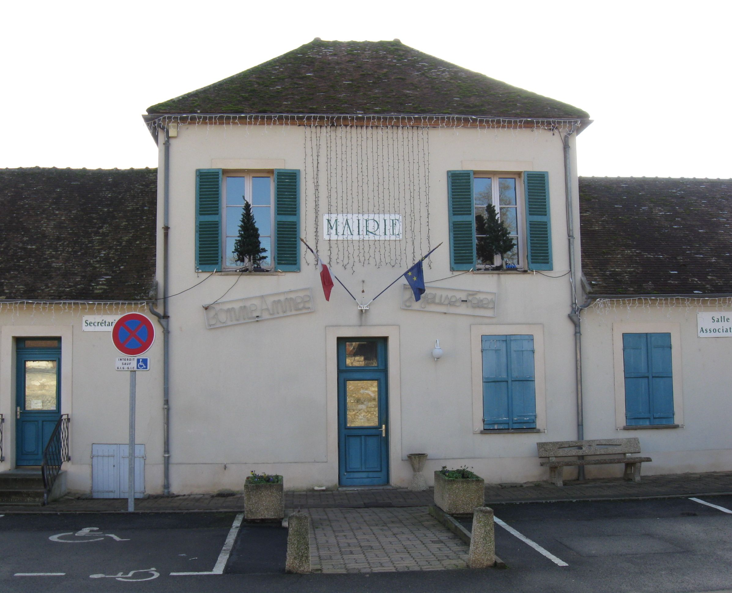 Mairie de Barbey. (Seine et Marne, région Île-de-France).